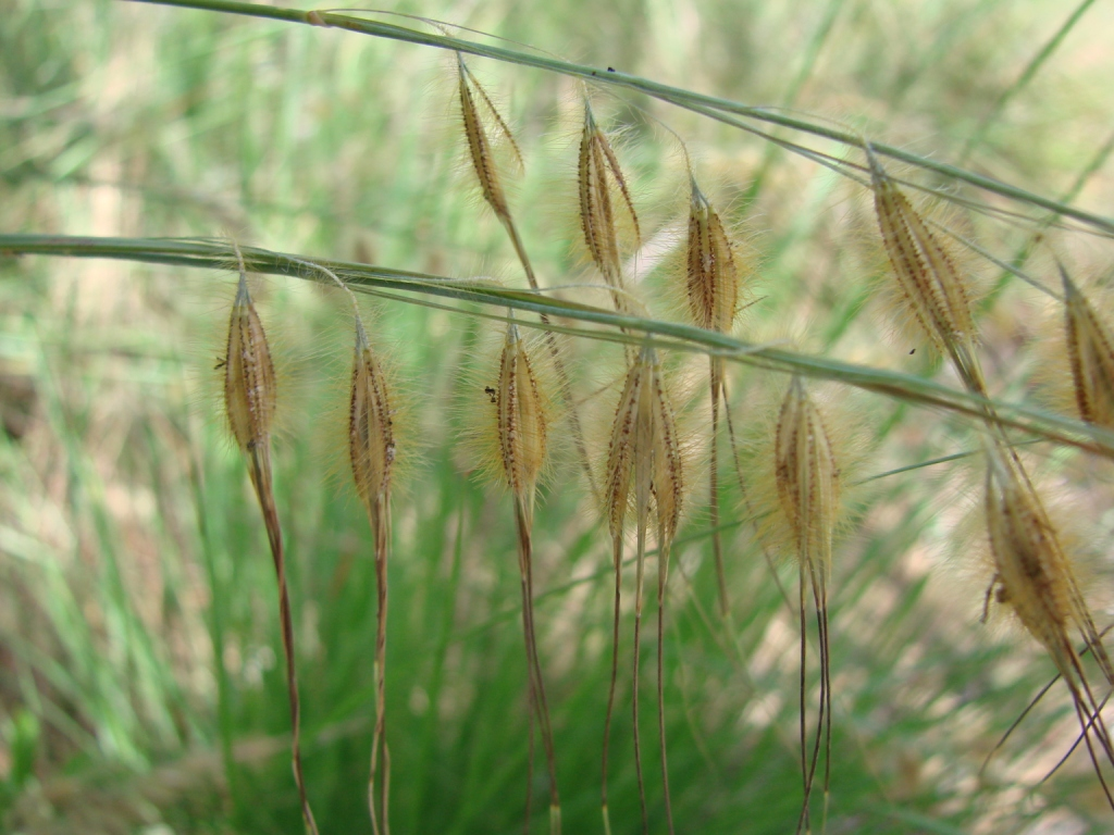 Loudetiopsis chrysothrix - POACEAE Parque Nacional da Chapada dos Veadeiros - Cavalcante - Goiás - Brasil.